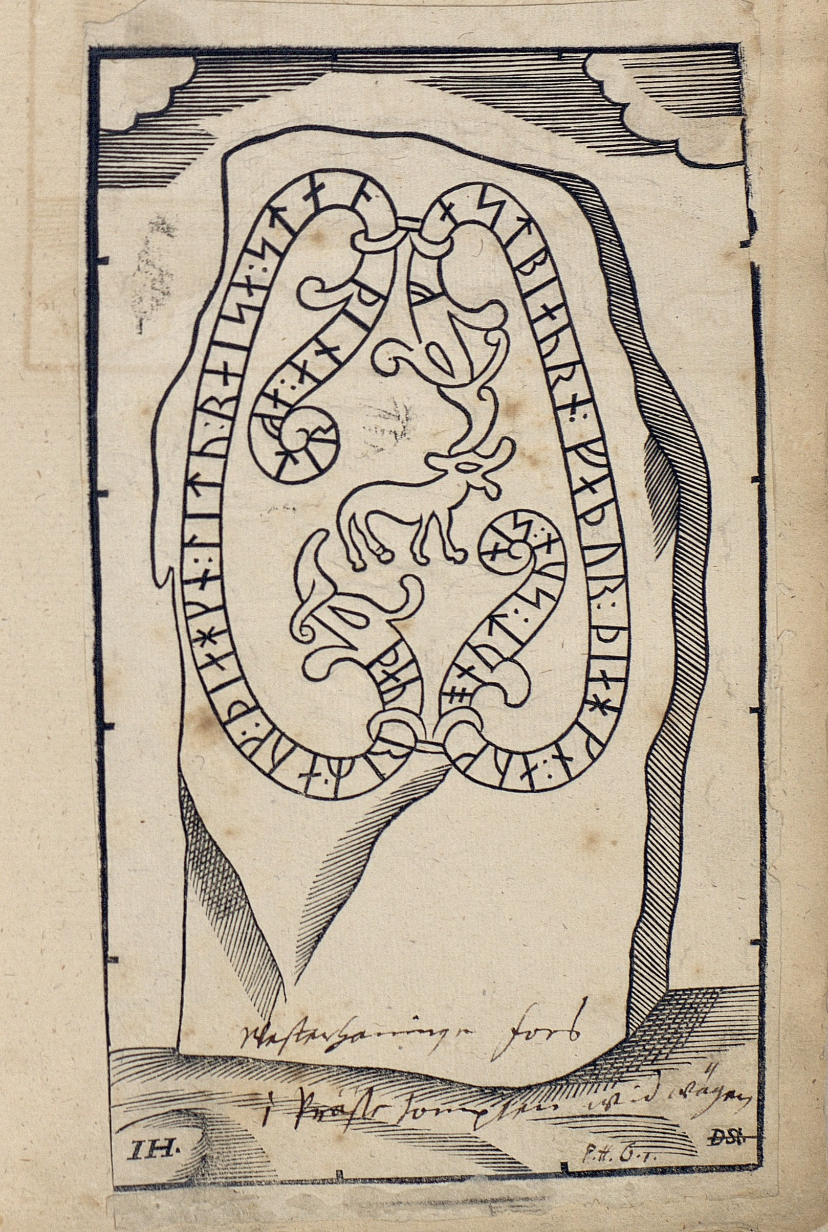 Södermanlands runinskrifter 237. År 1686 så reste studenten Petrus Helgonius runt i socknarna i Haninge och Ösmo. Stenen i Fors var en av 33 stenar som han avbildade.